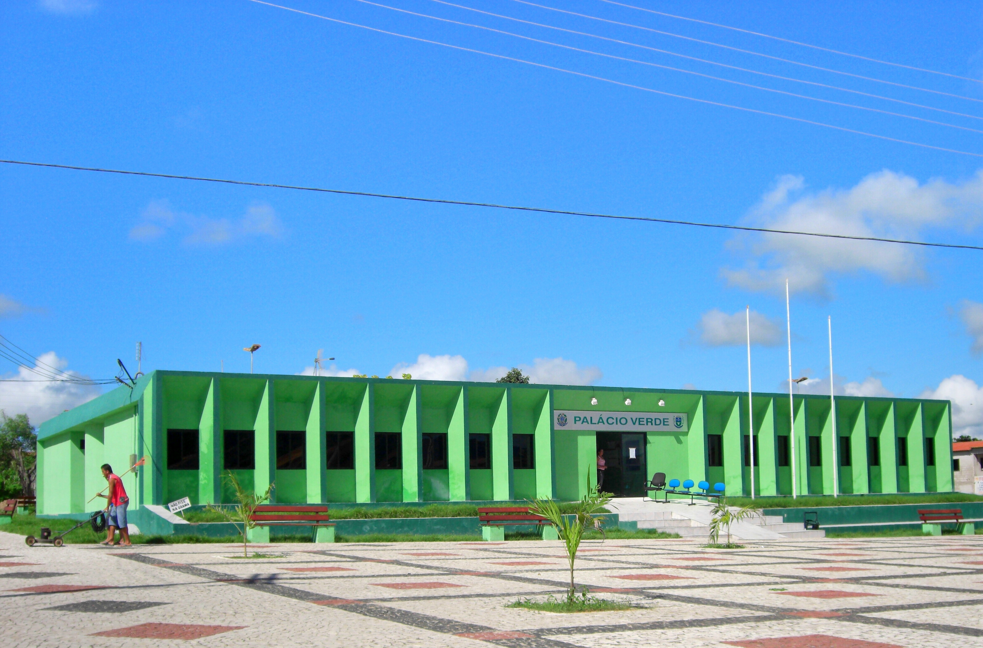 Sede do Governo Municipal